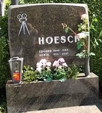 Eduard Hoesch-Heiligenstädter Friedhof (N-11-41)